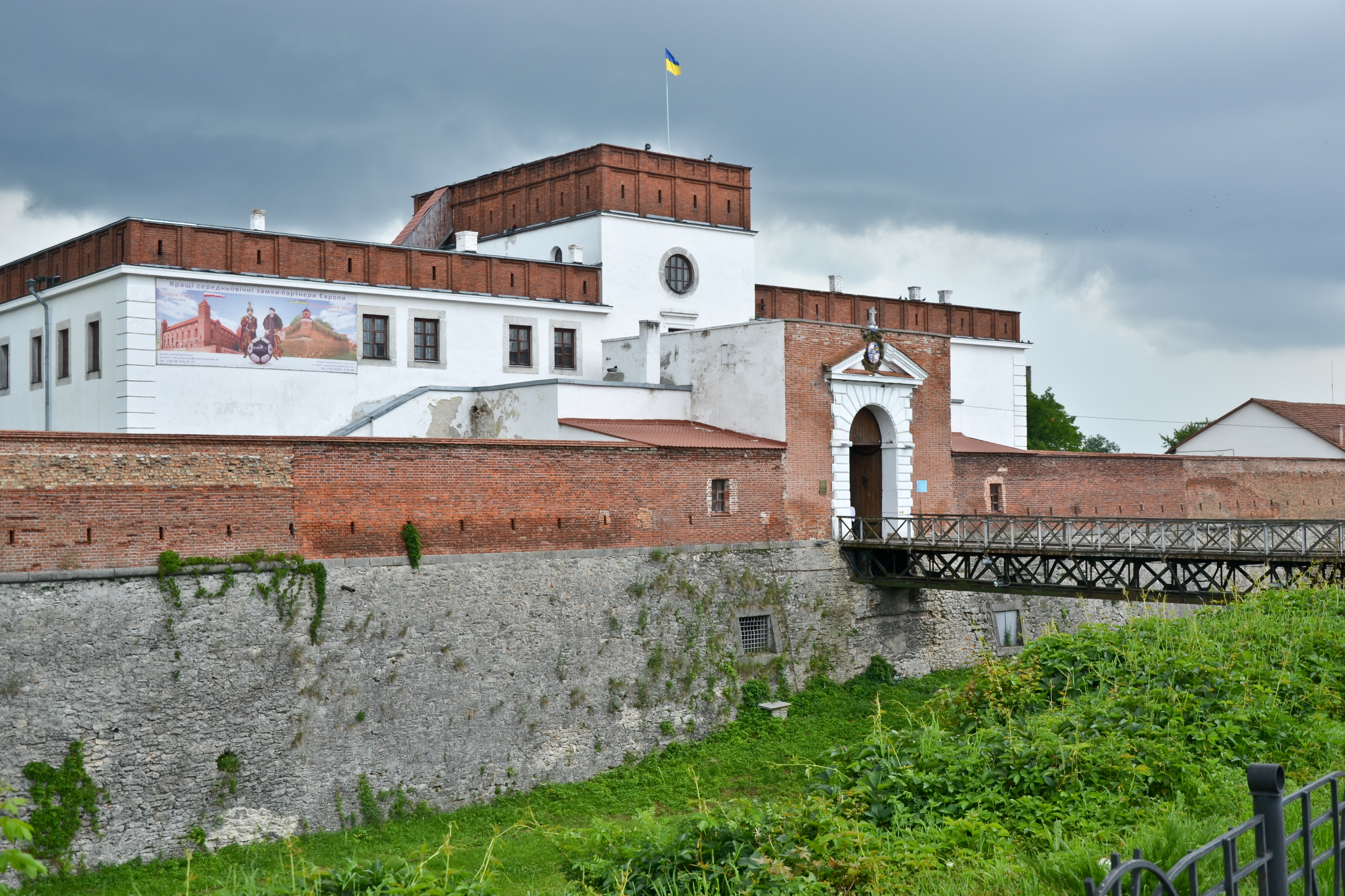 Надбрамний корпус (мур.), Дубно, вул.Шевченка